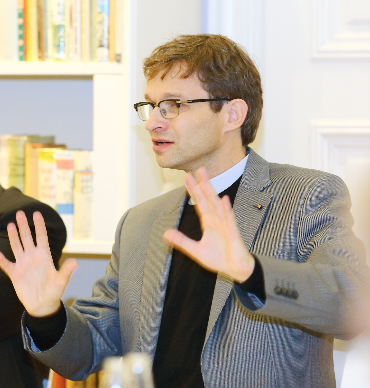 in einer Diskussion